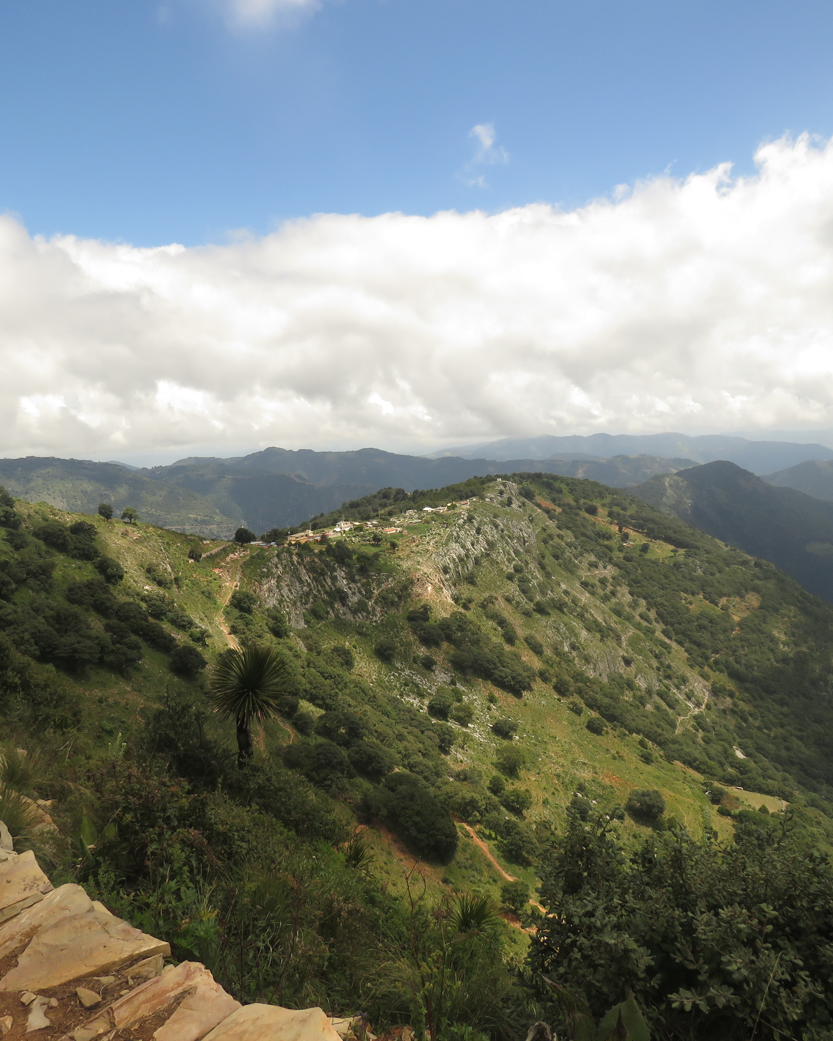 Vista de una de las montañas del mirador Cuatro Palos, Pinal de Amoles, Qro, Qro, México